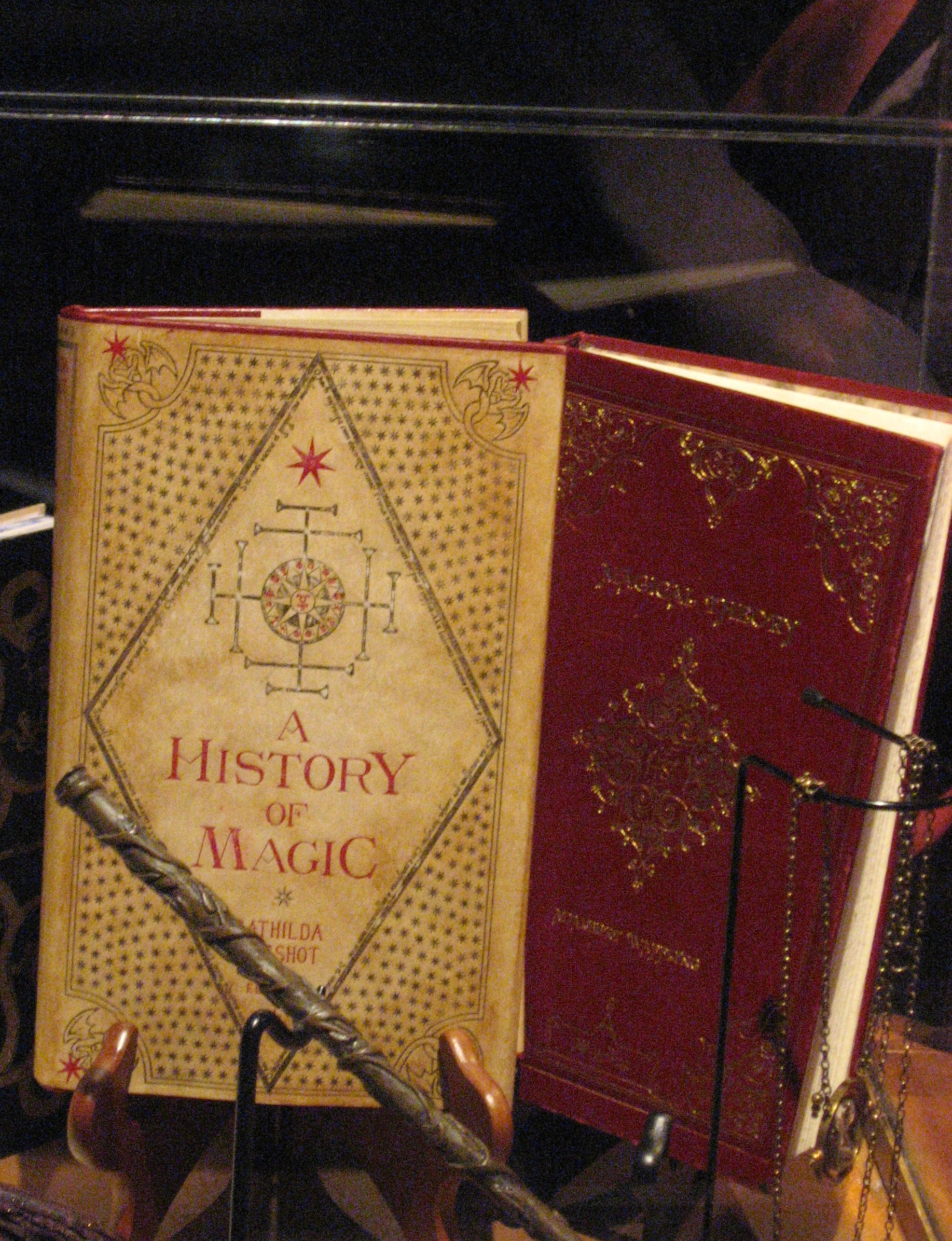 Livres de Poudlard, Harry Potter Exhibition, Cité du Cinéma, Saint Denis (Paris) avril 2015